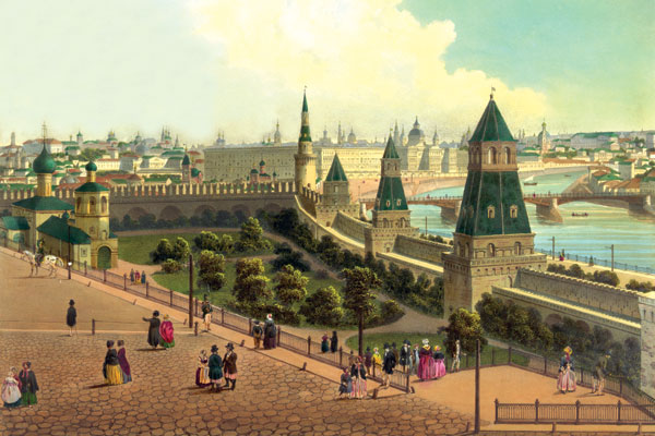 Тайницкий сад в Кремле, 19 век